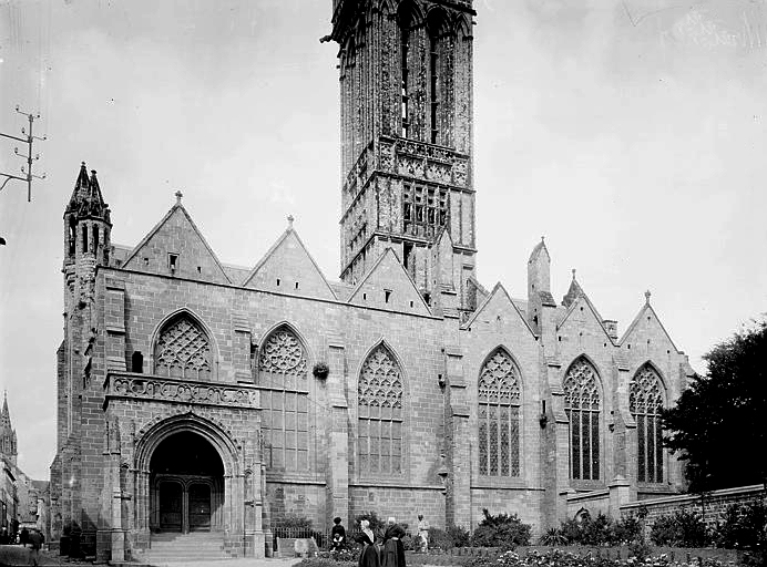 Façade et partie inférieure du clocher de l'église Notre-Dame du Kreisker (Creisker) à Saint-Pol-de-Léon (Finistère, Bretagne, France) vers 1900